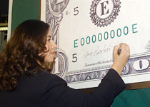 Anna Escobedo Cabral signs symbolic $1 bill